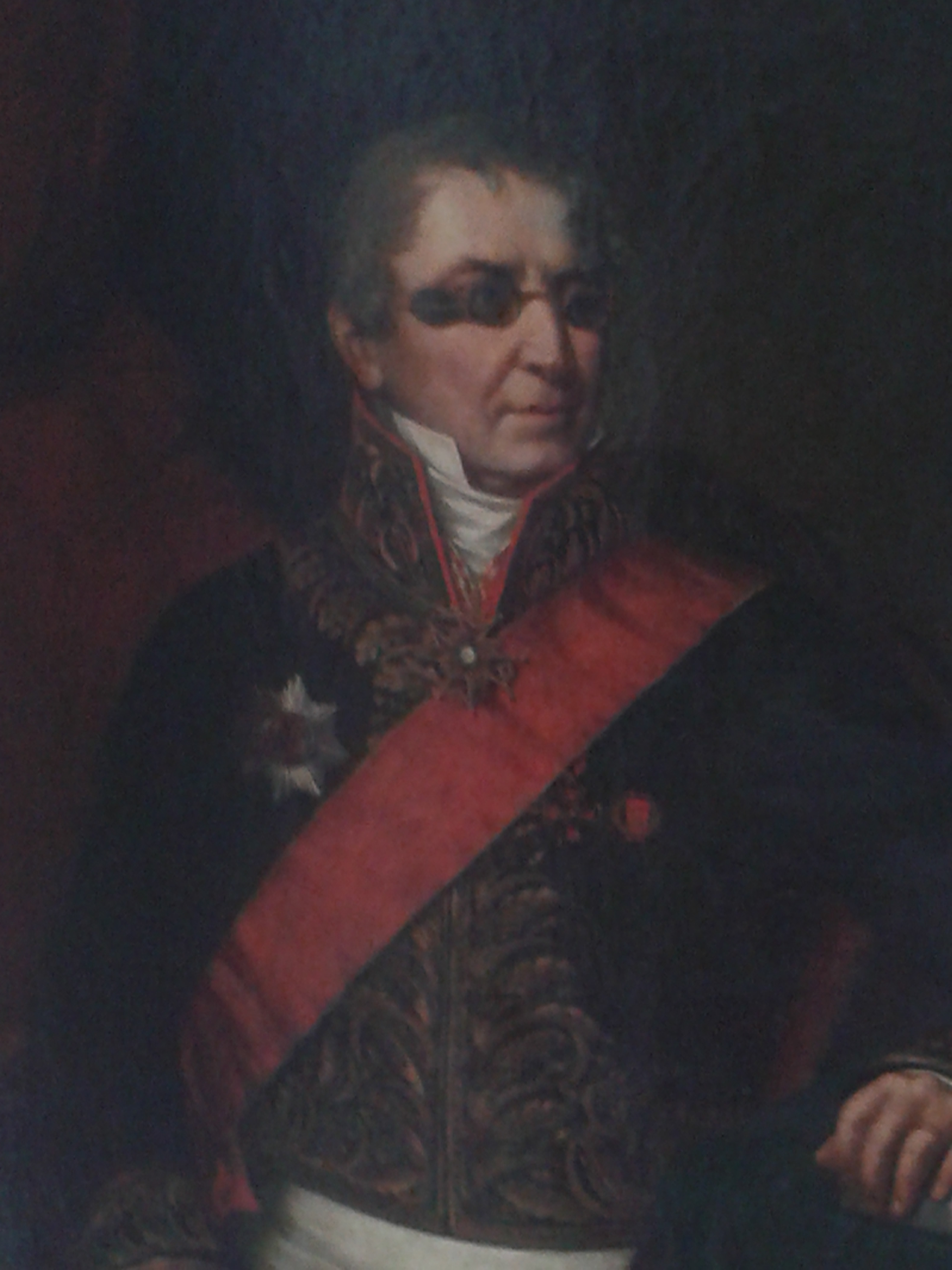 Portret Mikolaja Wiorogorskiego